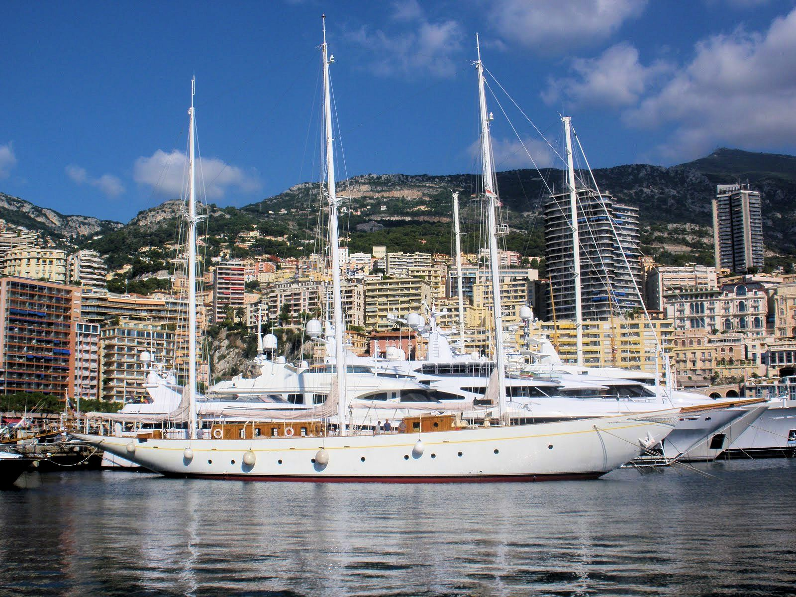 Forschungsschiff XARIFA des Meeresforschers Hans Hass 2007 im Hafen von Monaco.